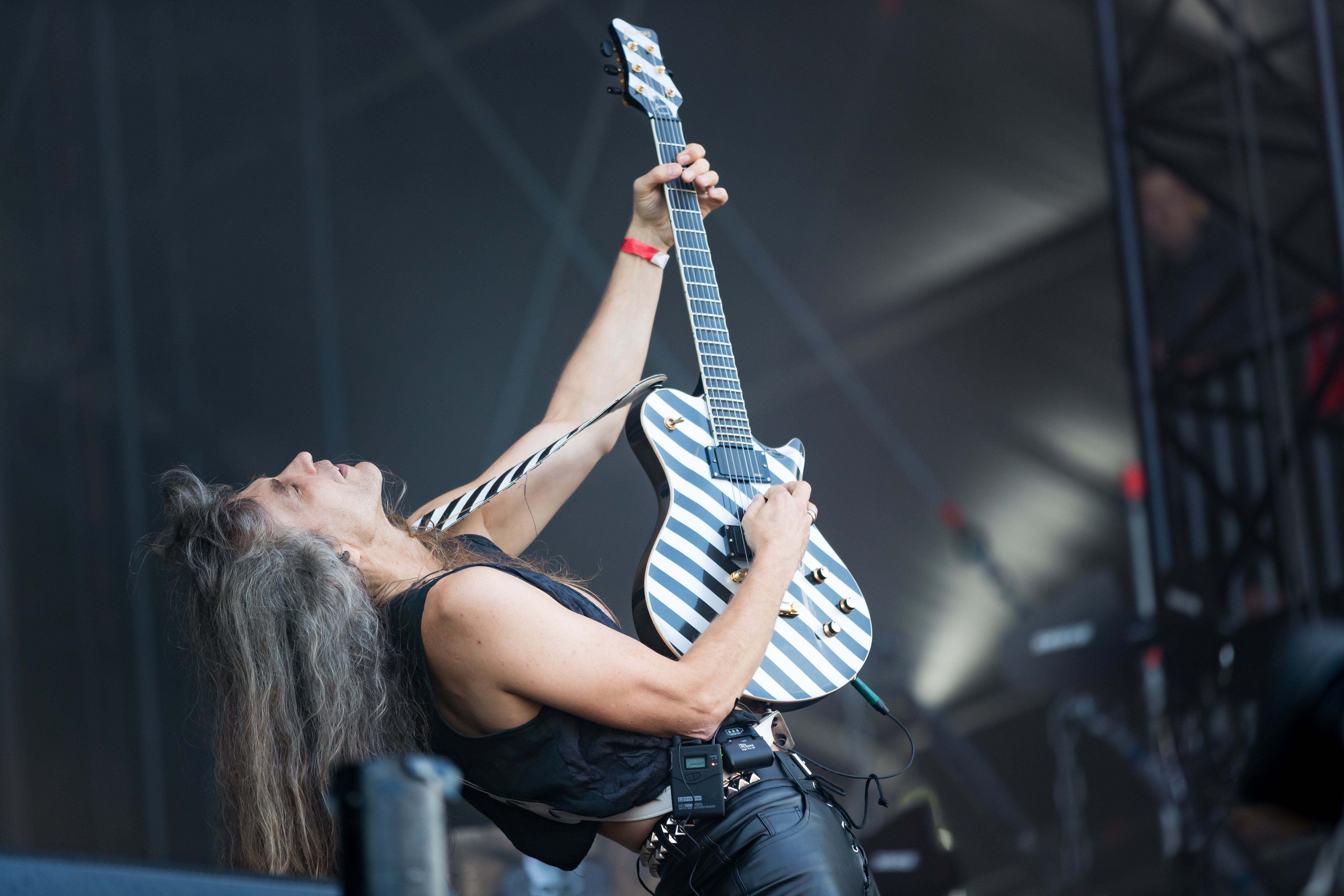 Grave Digger during Wacken Open Air at Schleswig-Holstein, Wacken, , Germany on 2017-08-04, Photo: Sven Mandel